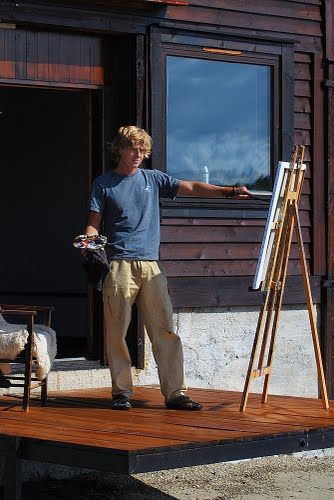 Stian Heimlund Skjæveland